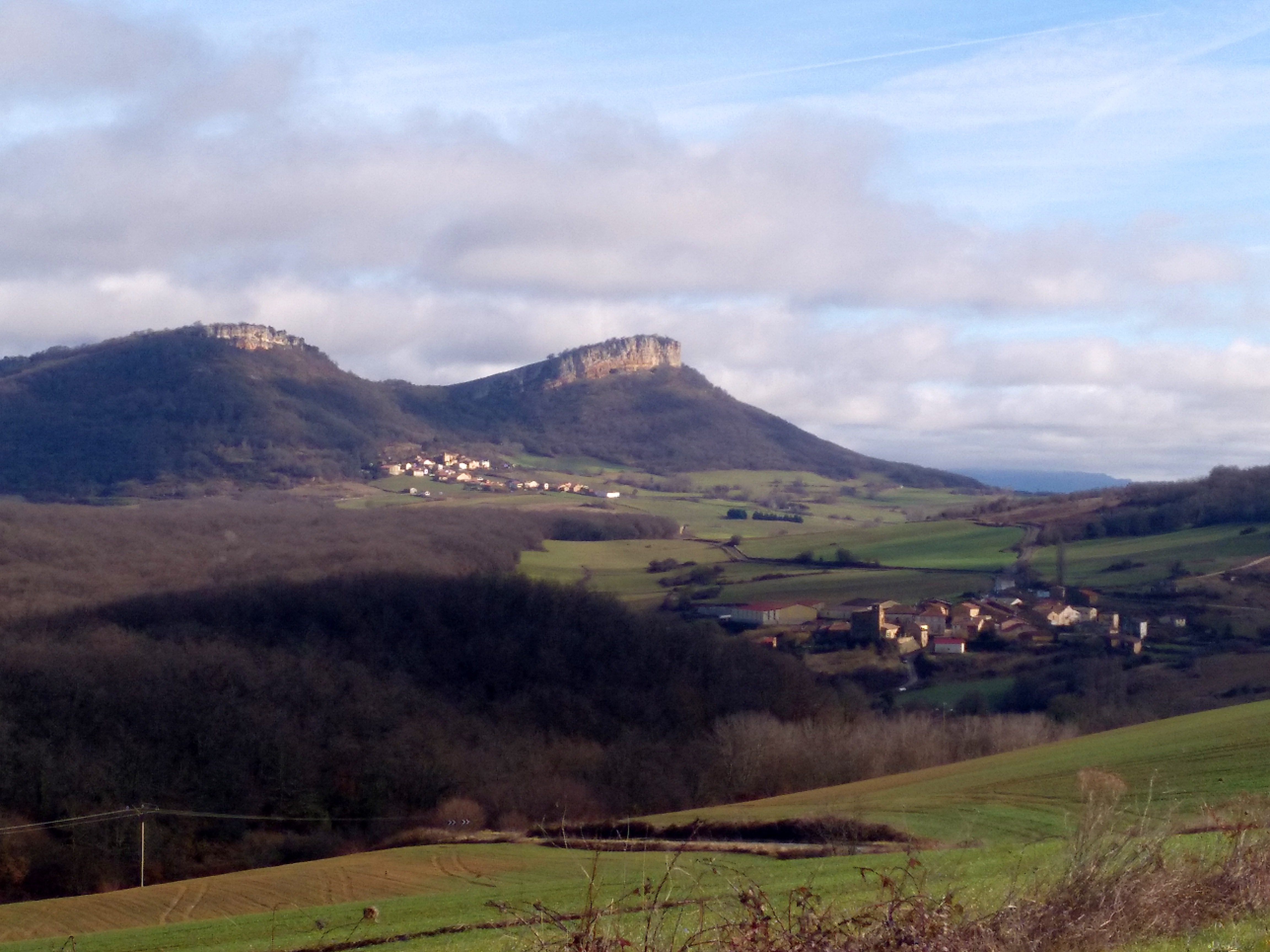 Kinta (gertu) eta Durruma (urrunago) herriak eta Muela mendia Bernedo udalerrian